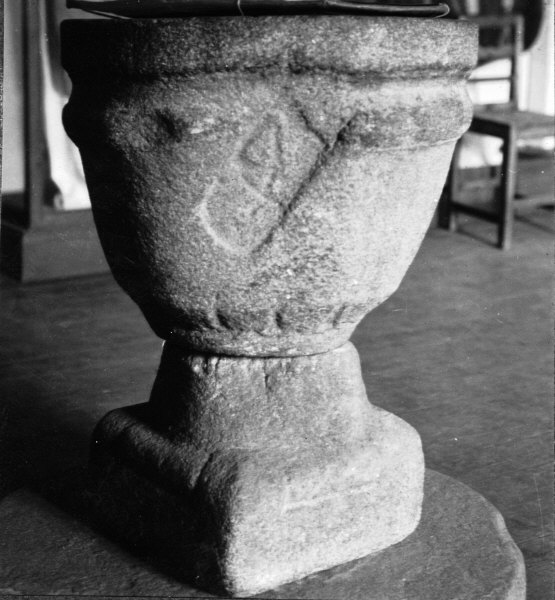 Dopfunt. Från 1200-talet. Kategori: (04) DopfuntarDopfunt. Från 1200-talet.